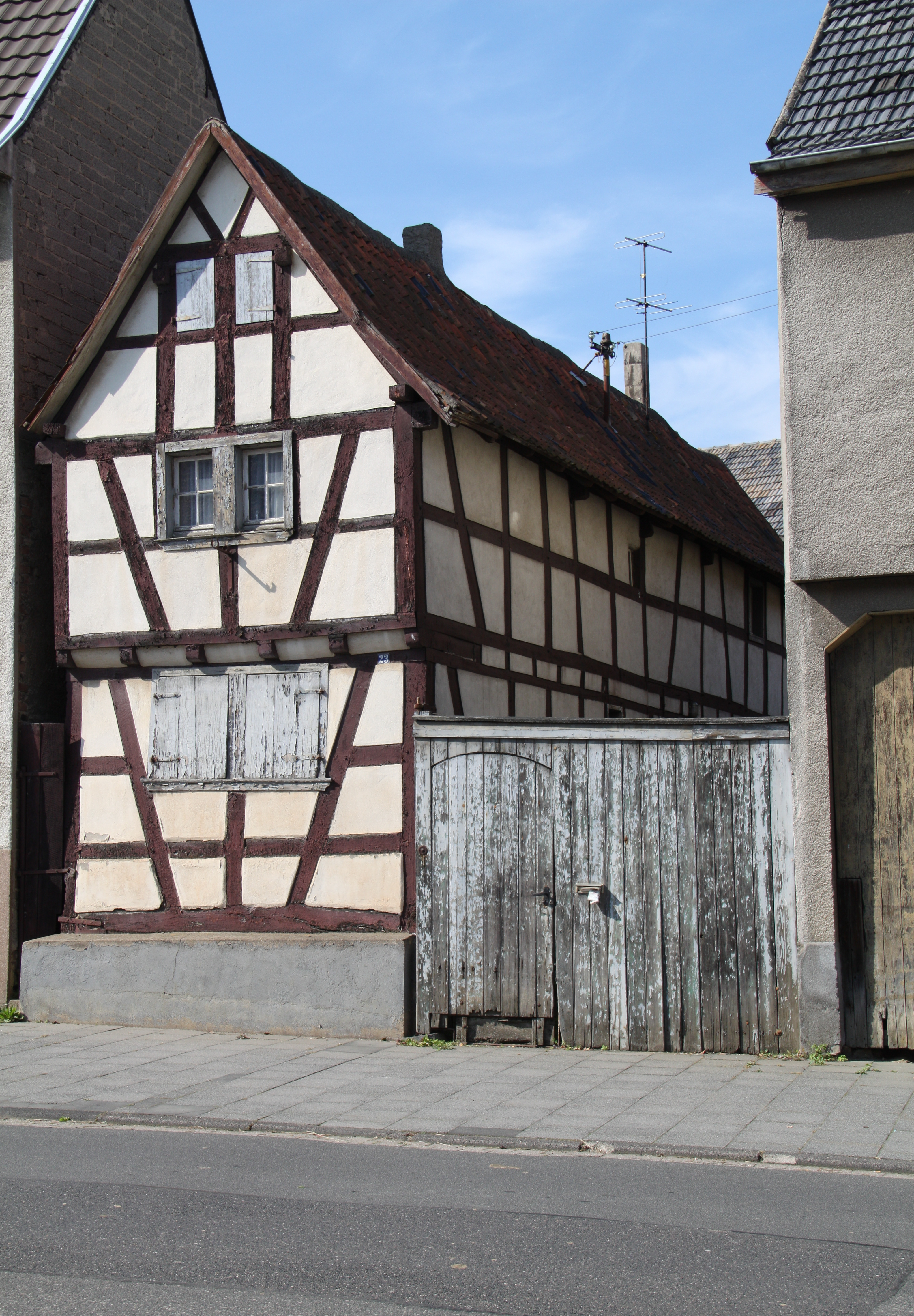 Fachwerkhaus, 18. Jahrhundert, Bonner Strasse 23, Gelsdorf (Gemeinde Grafschaft, Rheinland-Pfalz), Ansicht von der gegenüberliegenden Strassenseite (Die Farbe der hellen Wand ist kein weiß, sondern wirklich wie im Bild eher ein hellgrau-gelblich. Das Bild gibt somit die Farbe relativ real wieder.)